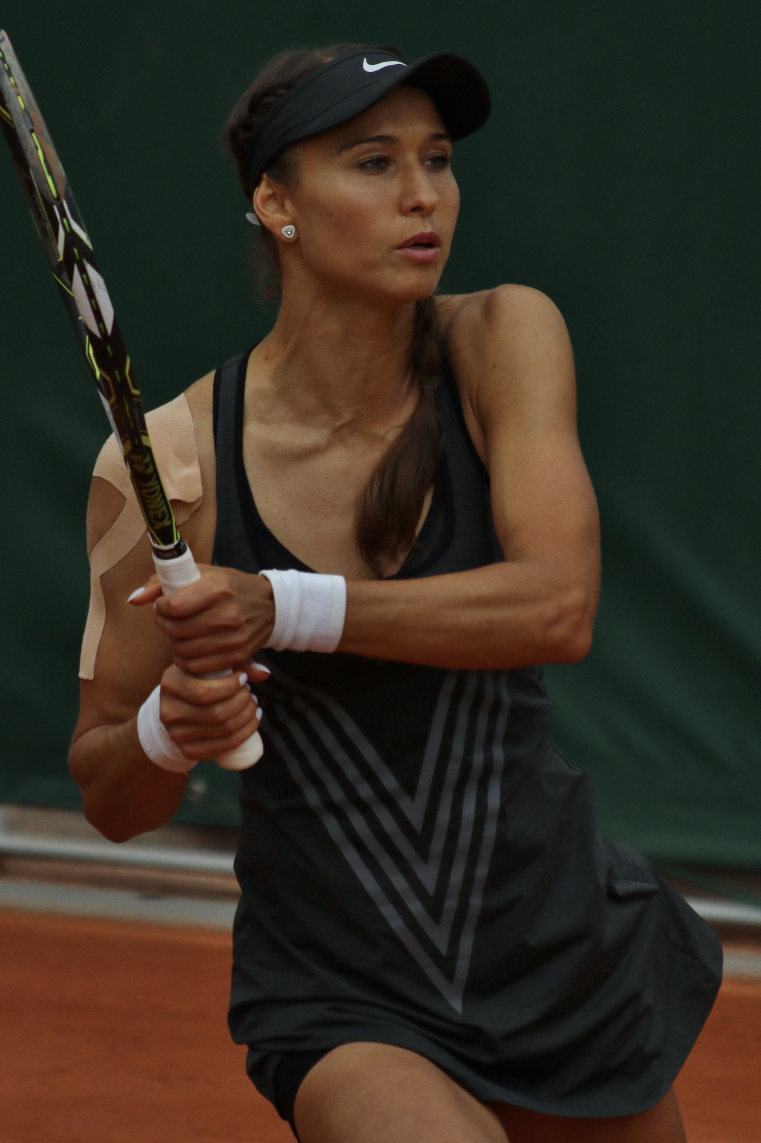 Diatchenko RG19 (16)